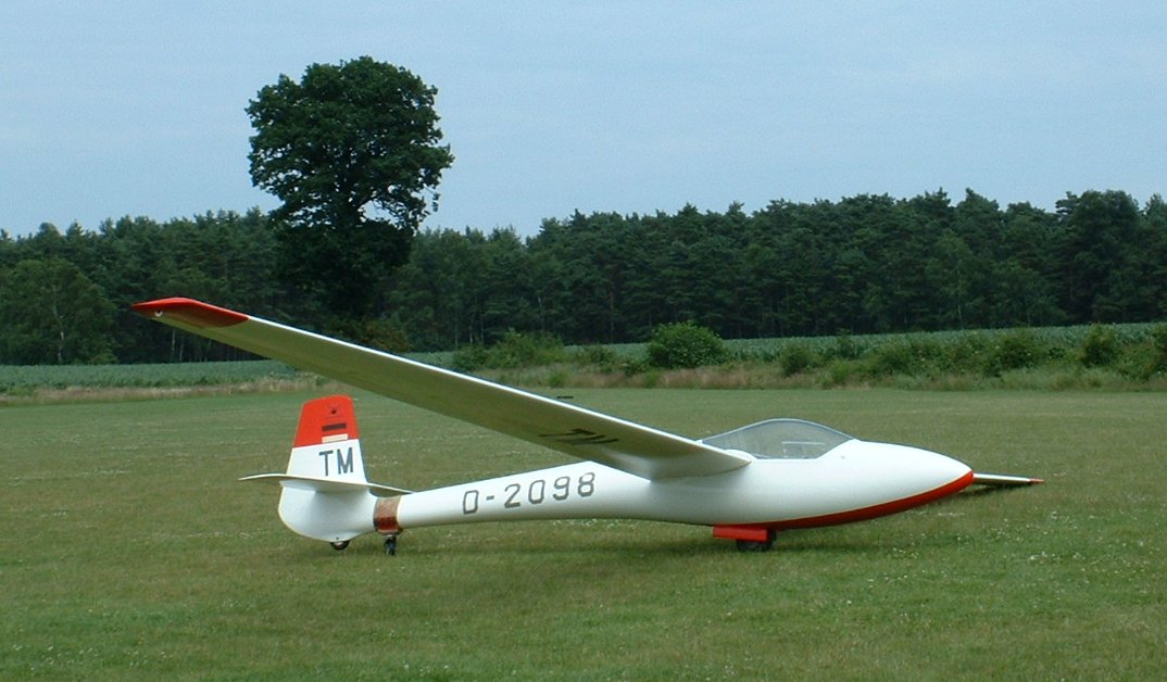 Glasflügel Standard Libelle H201B